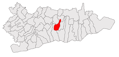 Categorie:Hărţi ale judeţului Călăraşi